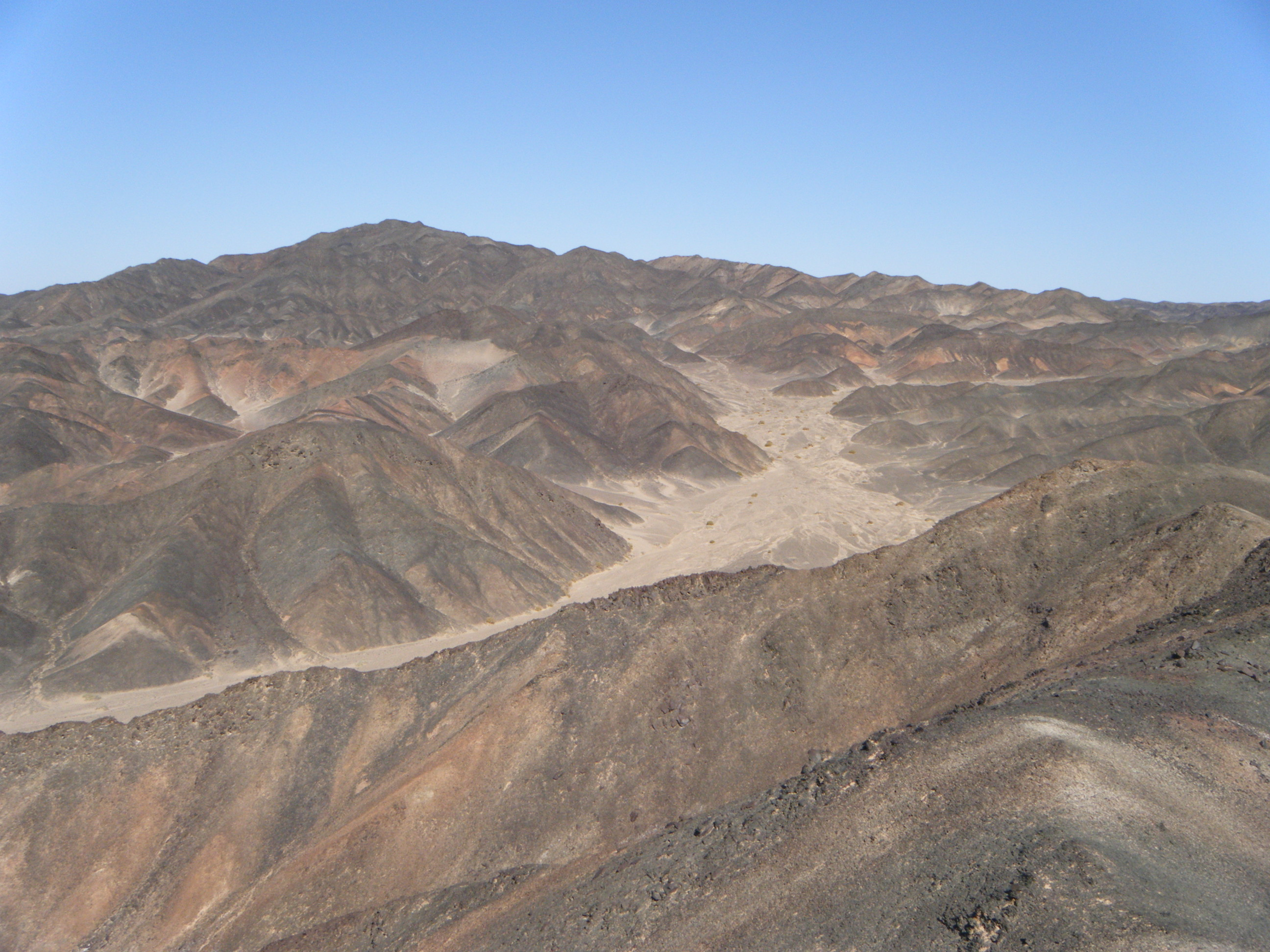 Lop Nor